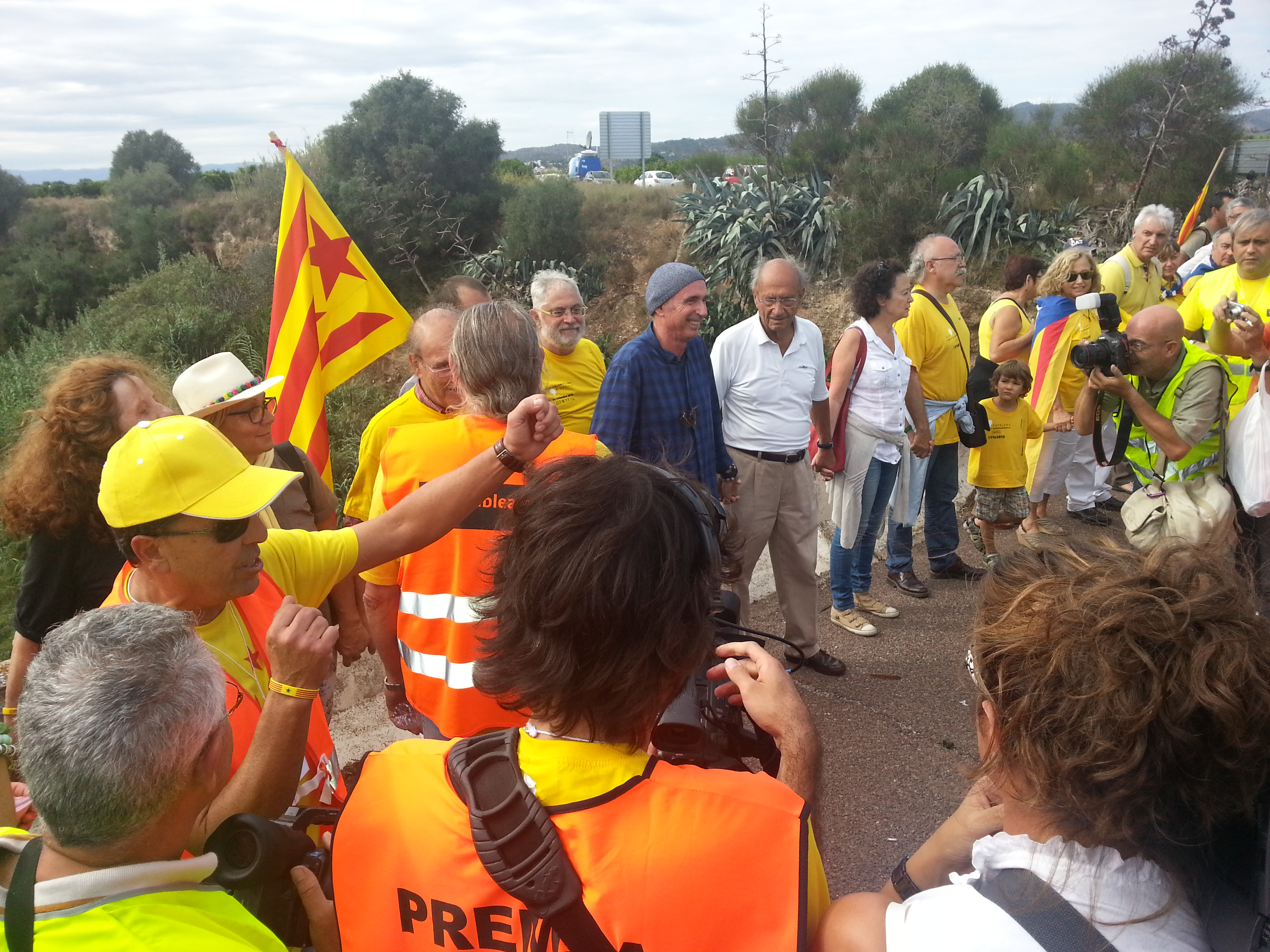 Punt on la Via Catalana s'unia amb em Tram dem País Valencià